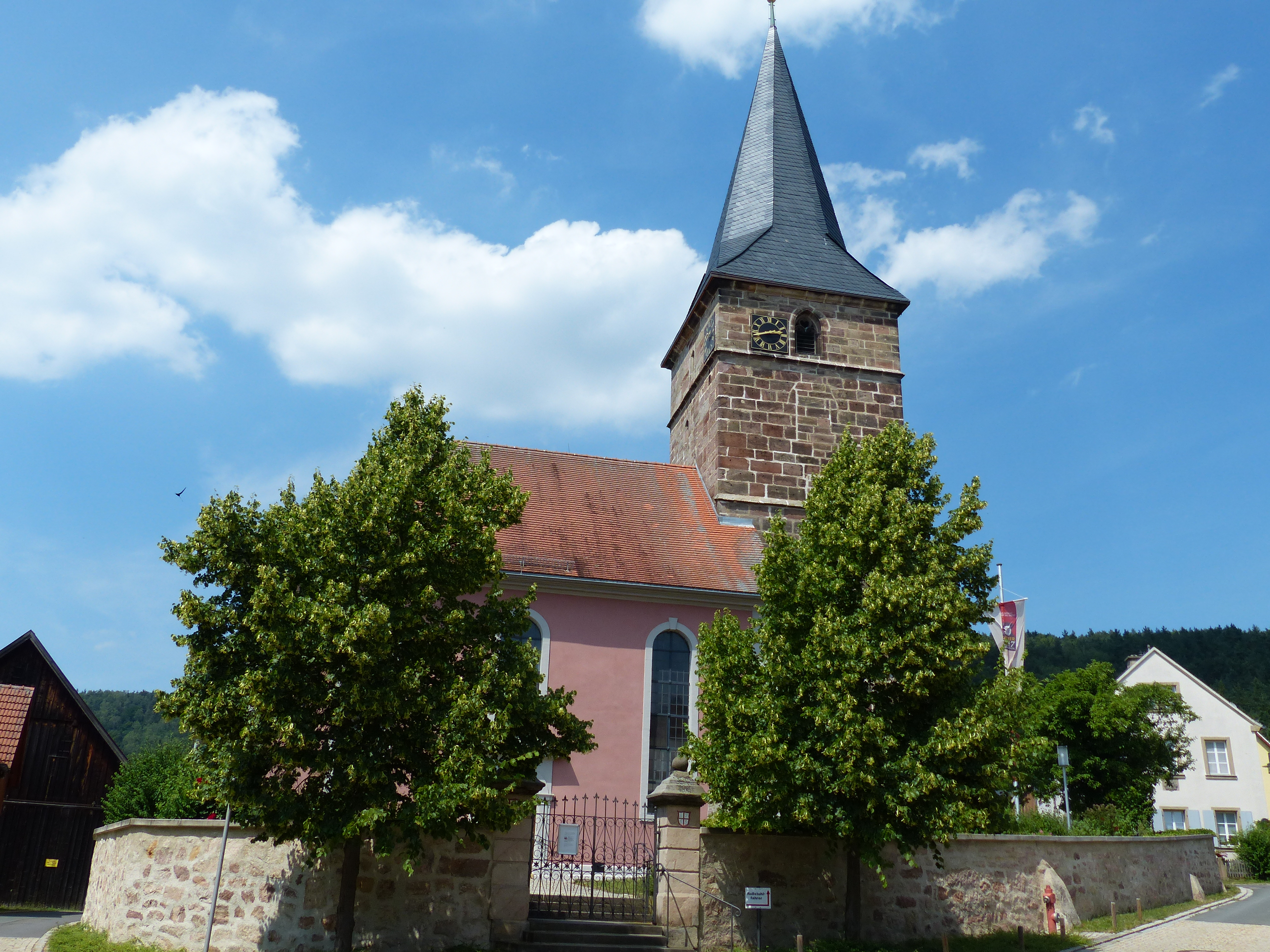 Ansicht der Kirche St. Martin